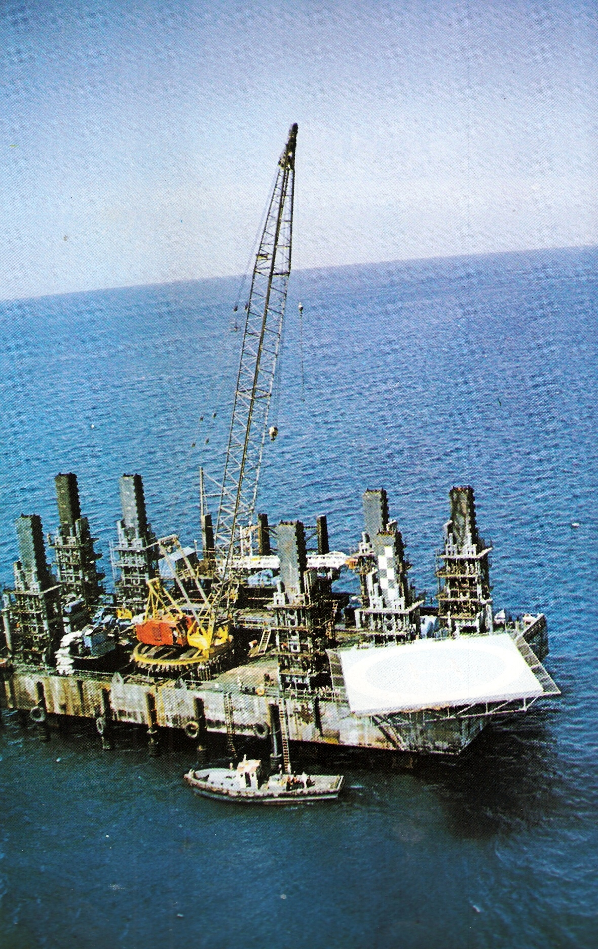 באר נפט ימית בשדה אבו רודס 1972